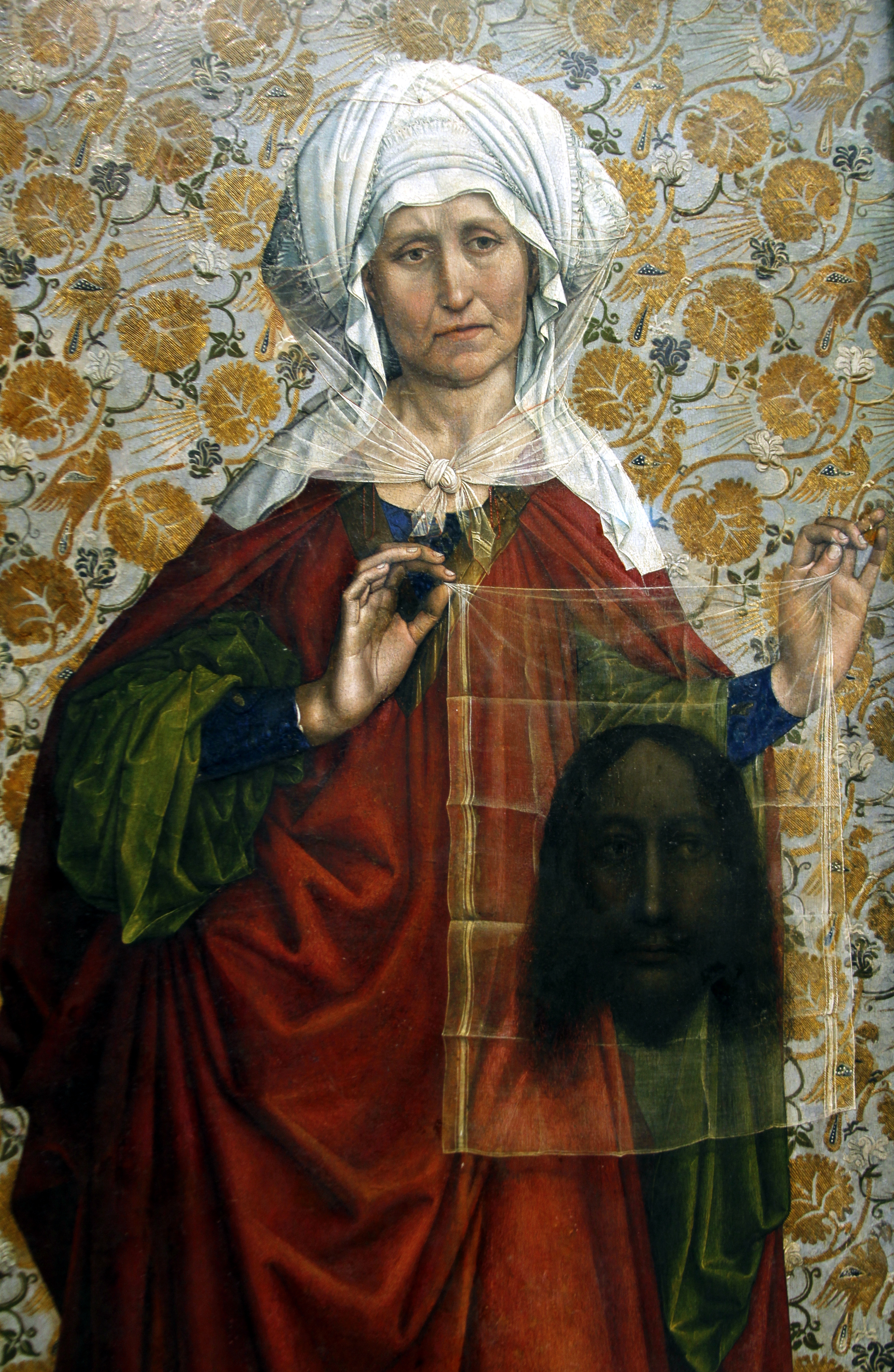 Städel - Frankfurt am Main - Germany